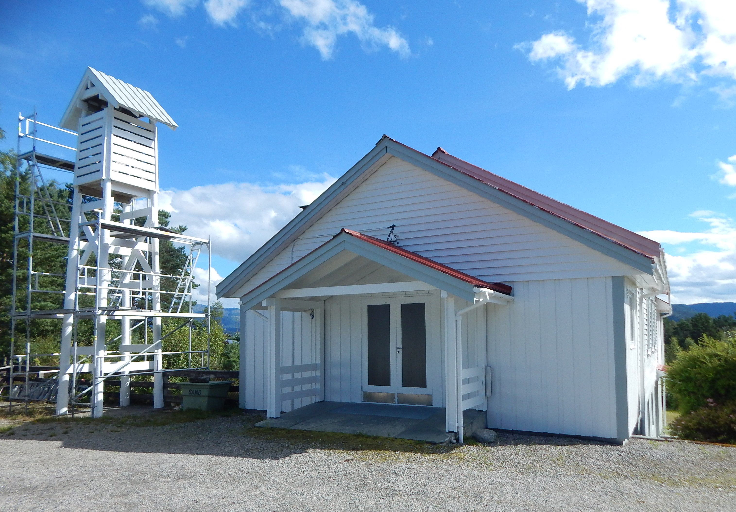 Hellevik bedehuskapell i Fjaler